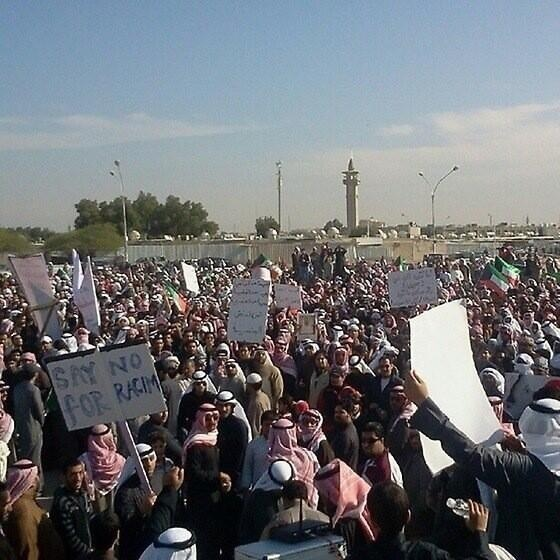 Bedoon bidun